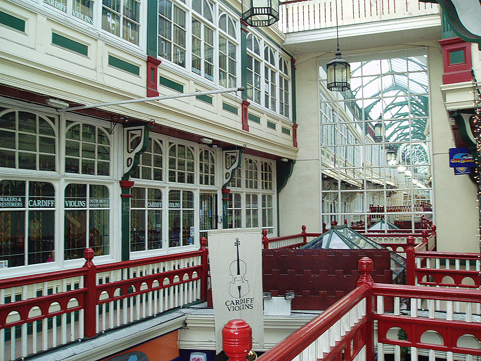 Arcade. Centro comercial urbano en el centro de Cardiff, País de Gales.